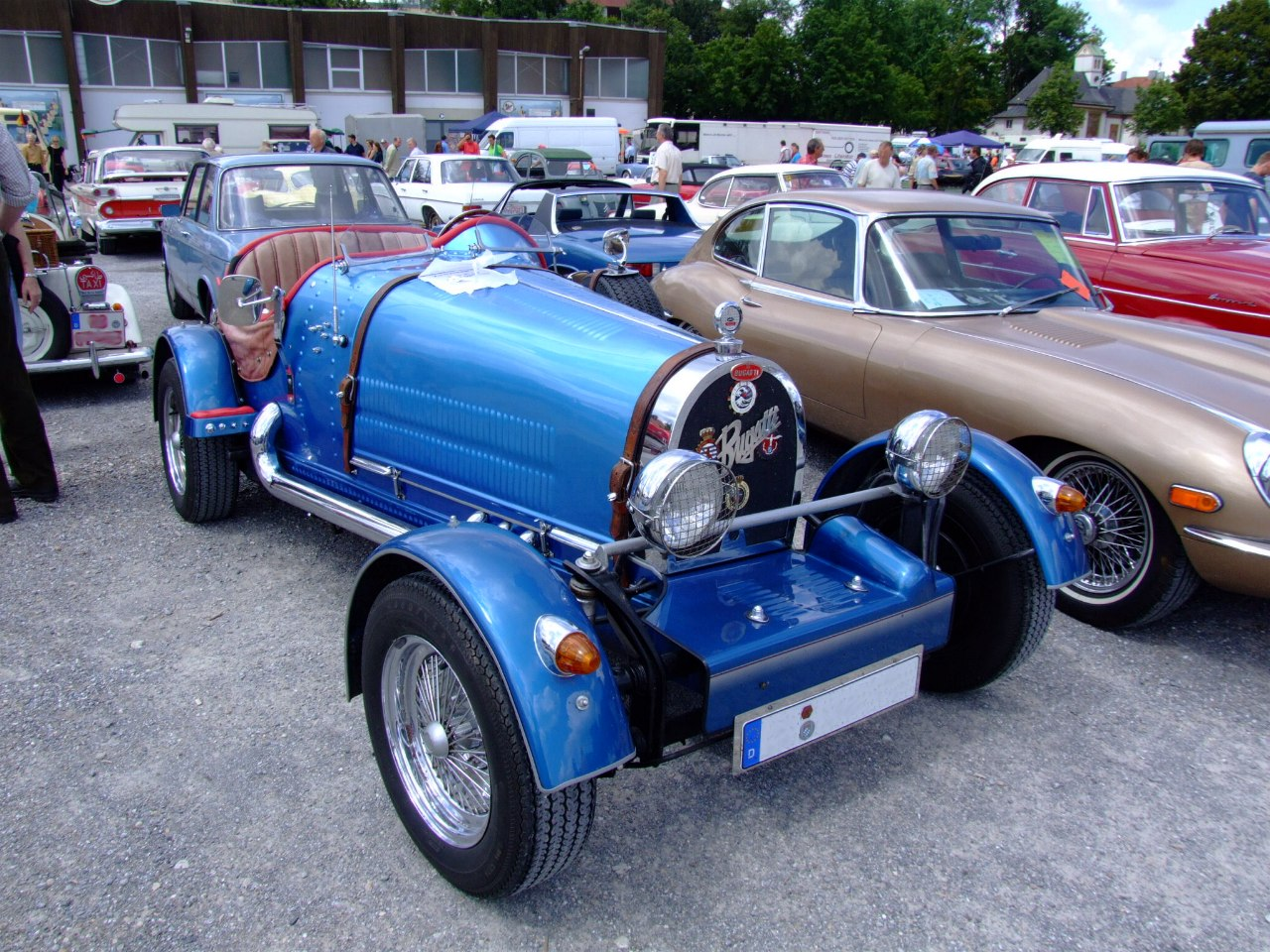 Bugatti Kitcar